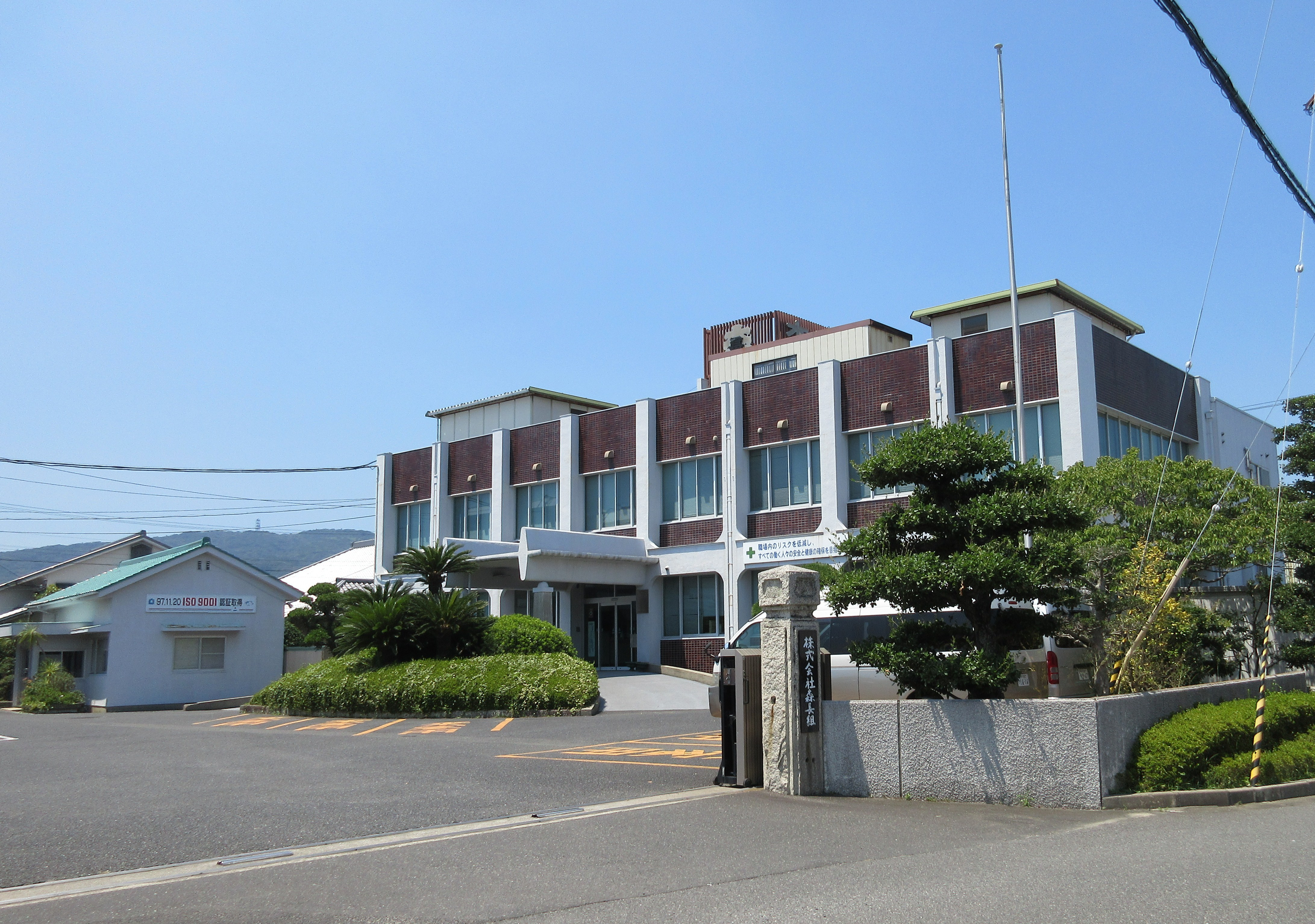 森長組本社